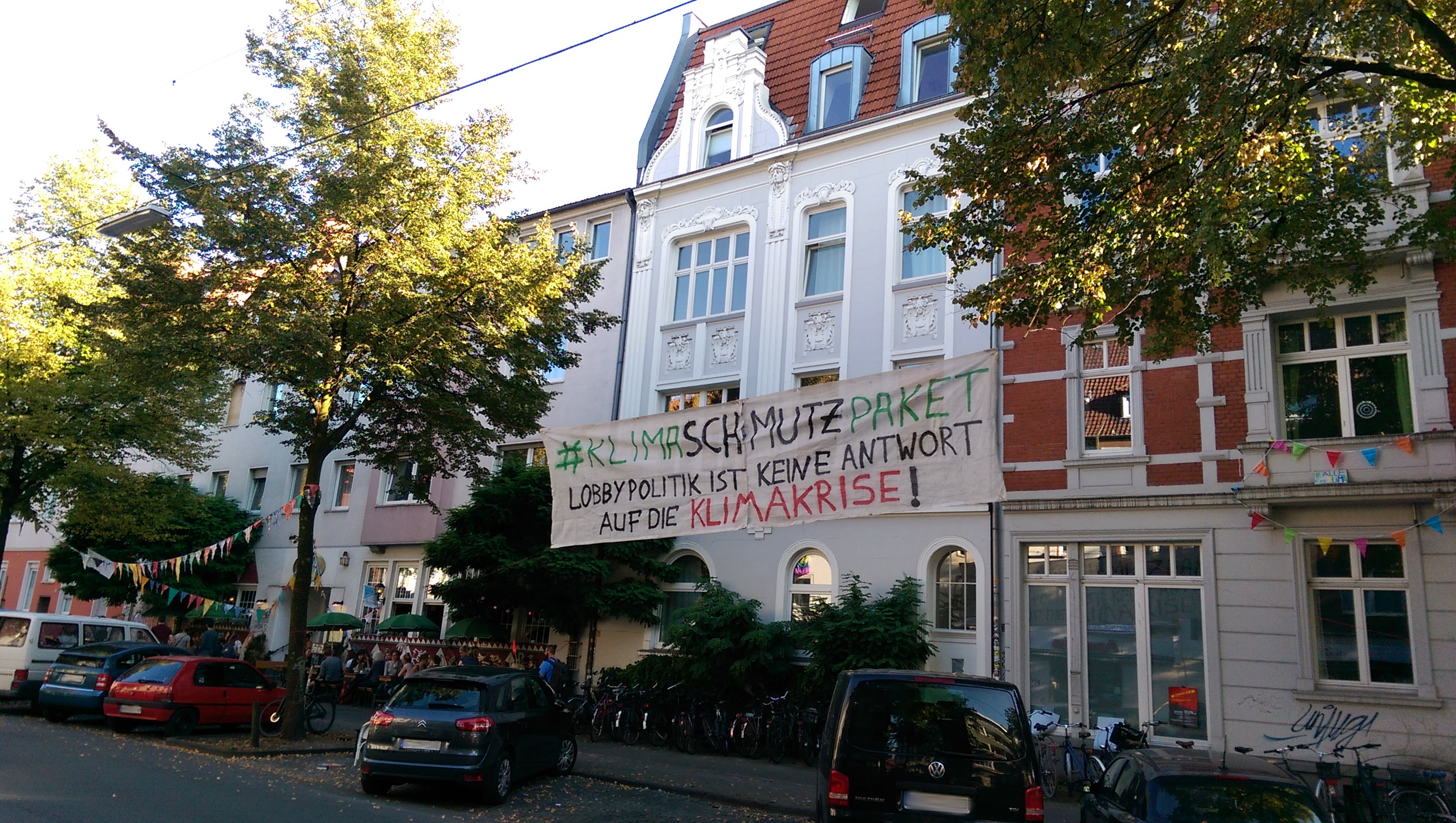 In Münster, Westfalen wurde im Hansaviertel spontan ein Banner aufgehängt, welches Kritik an dem zuvor von der Bundesregierung beschlossenen Klimaschutzpaket übt. Auf dem Banner wurden folgende Worte gesprayt: "#Klimaschmutzpaket - Lobbypolitik ist keine Antwort auf die Klimakrise!"